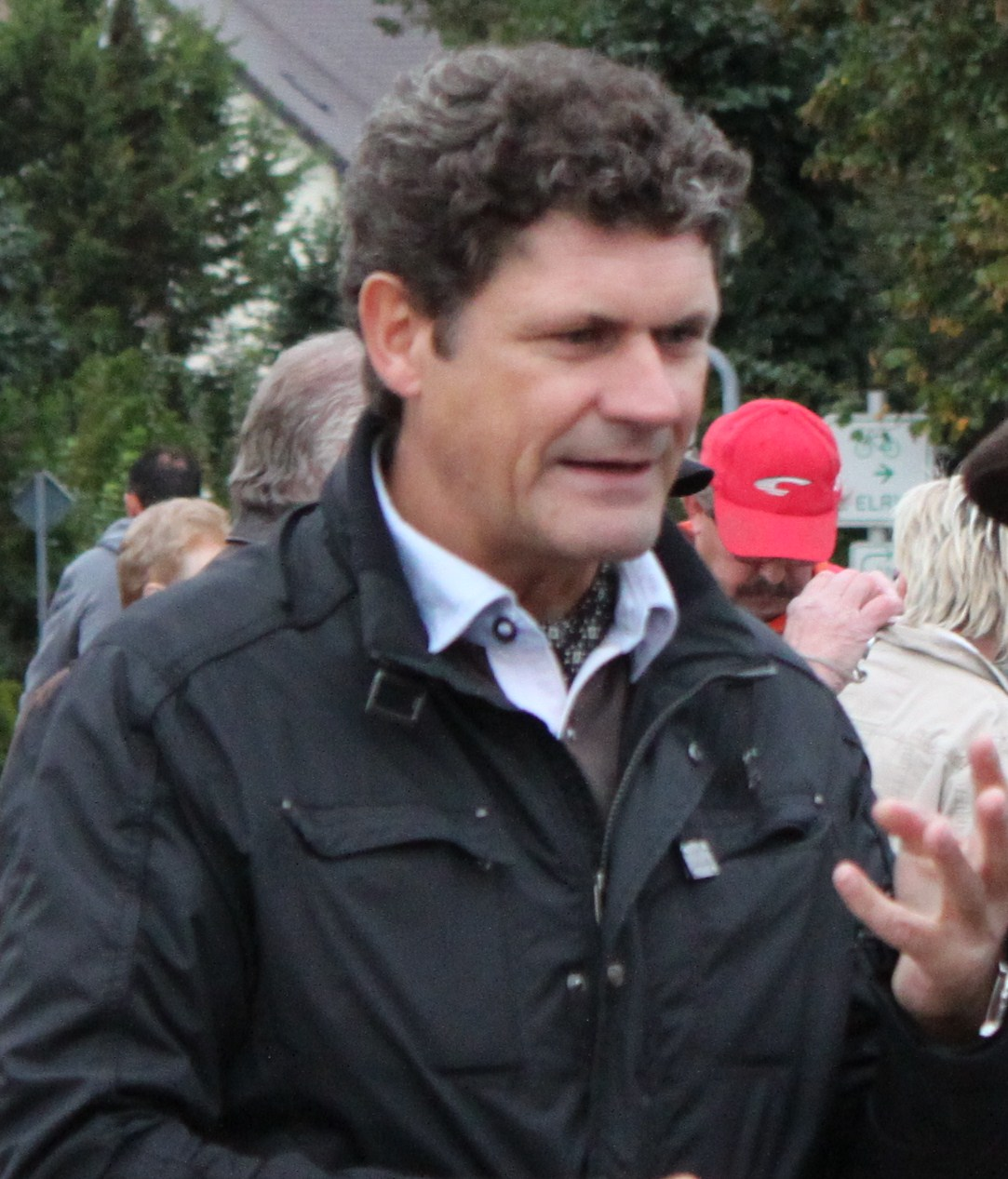 Hochwasser der Schwarzen Elster in Bad Liebenwerda. Der Jurnalist und Moderator Gerald Meyer im Gespräch mit dem Präsident des Landesamtes für Umwelt, Gesundheit und Verbraucherschutz Brandenburg Prof. Matthias Freude.